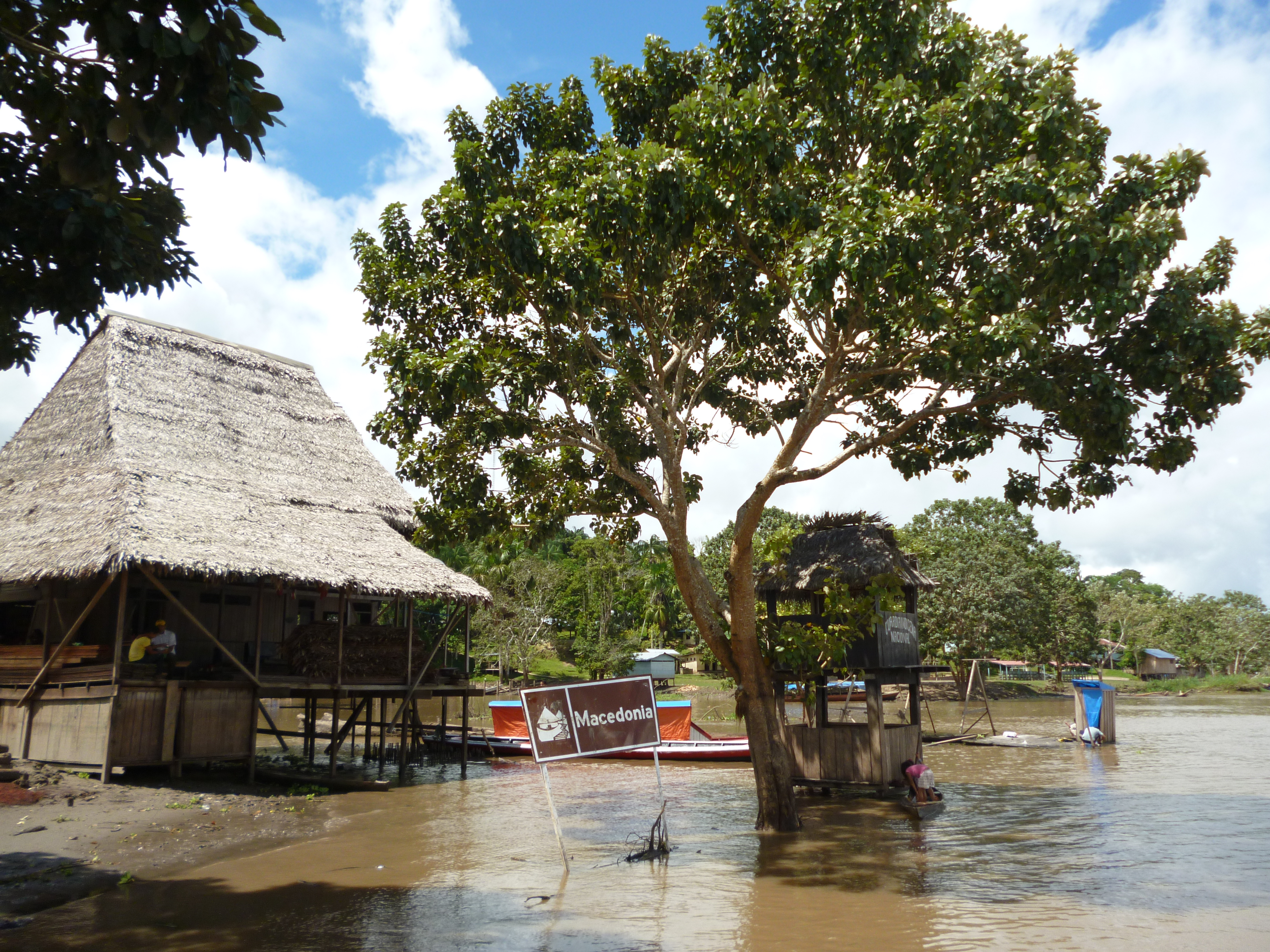 Mono de la isla de los monos